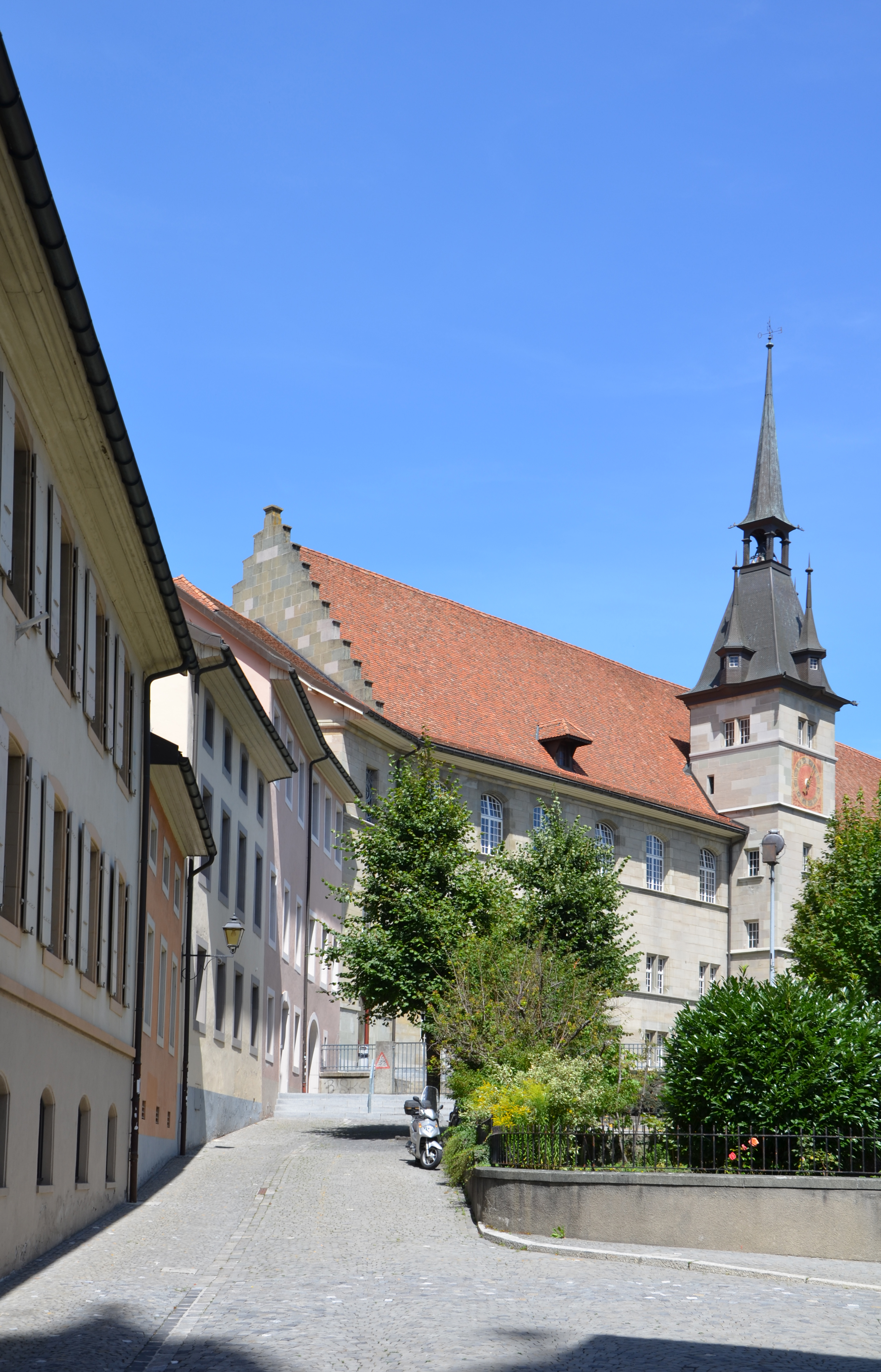 L'Ancienne Académie de Lausanne (Suisse), actuel gymnase de la Cité